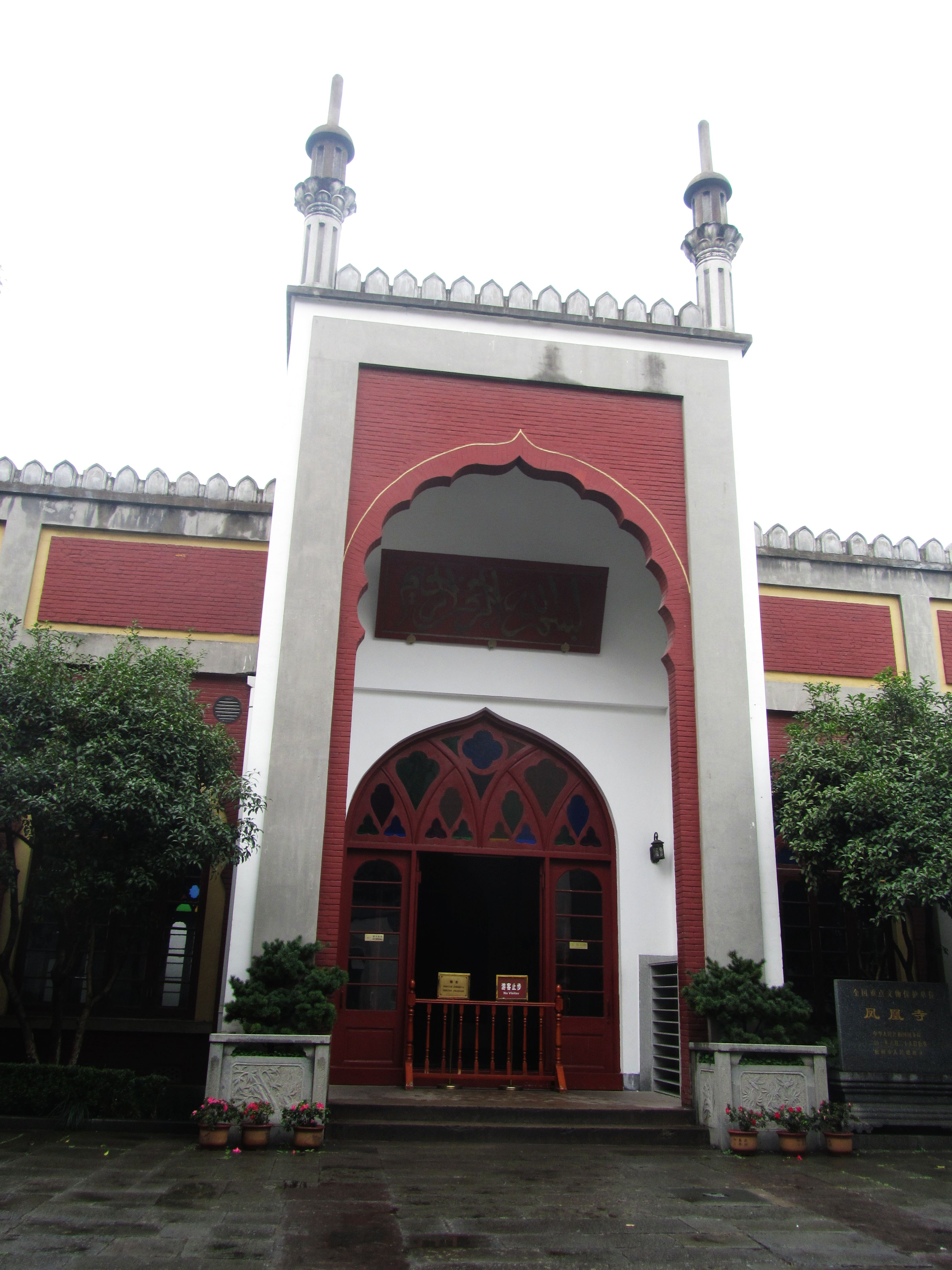 杭州凤凰寺，大殿前门。